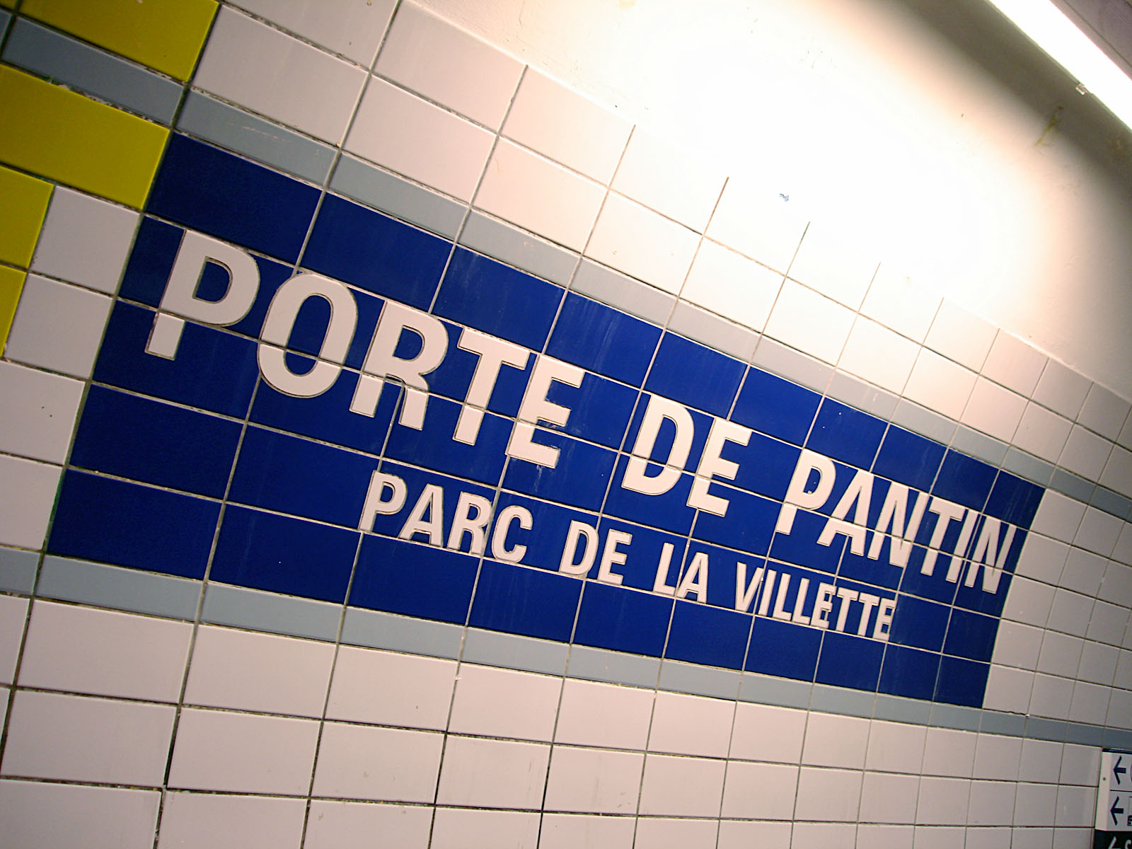 Panneau de la station Porte de Pantin de la ligne 5 du métro de Paris, France.